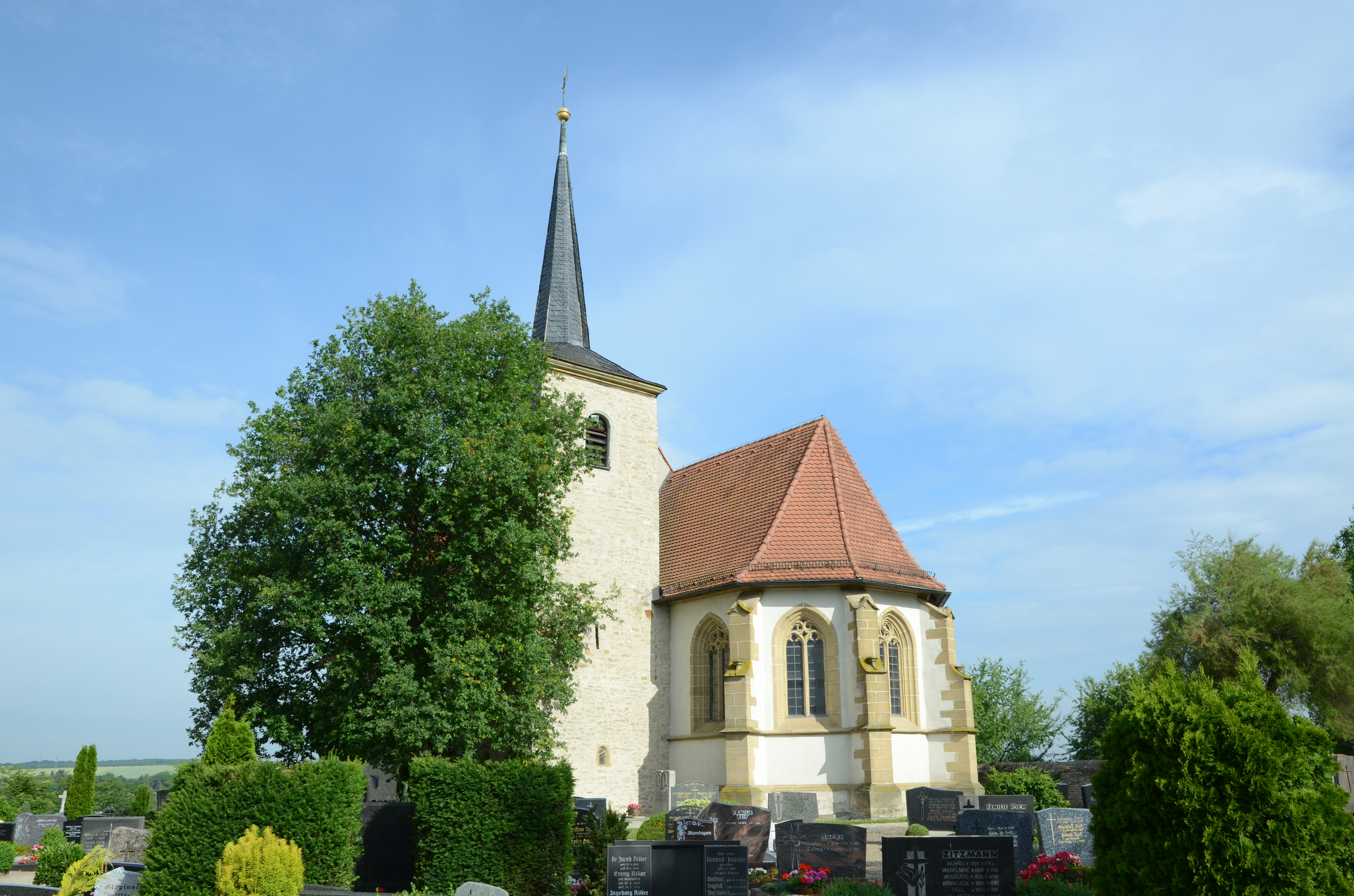 Bergkirche St. Margarehte in Hohenfeld